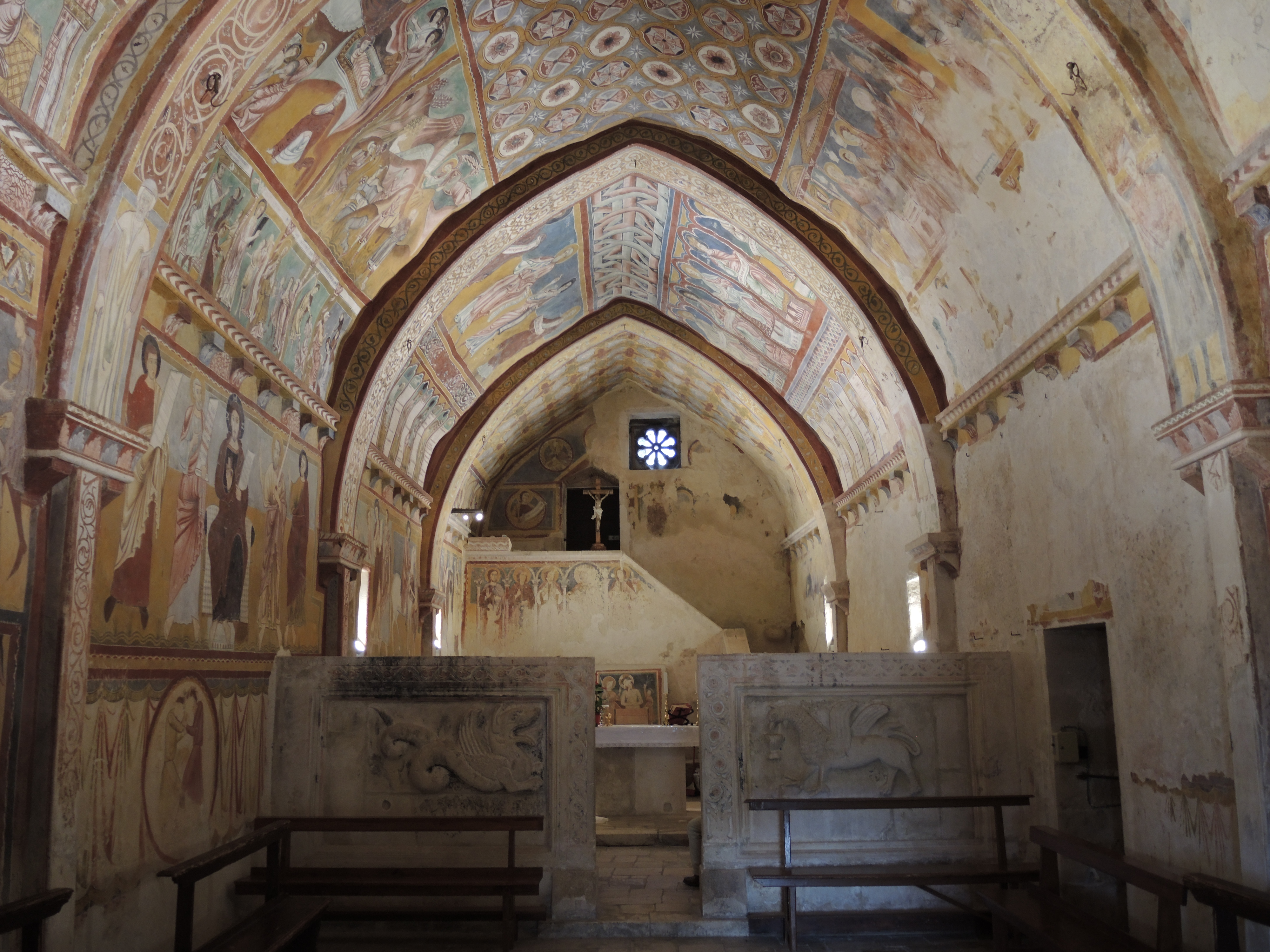 Bominaco: Oratorio di San Pellegrino